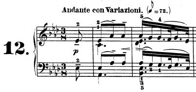 Compassos iniciais do primeiro movimento da Sonata Op. 26 de Beethoven